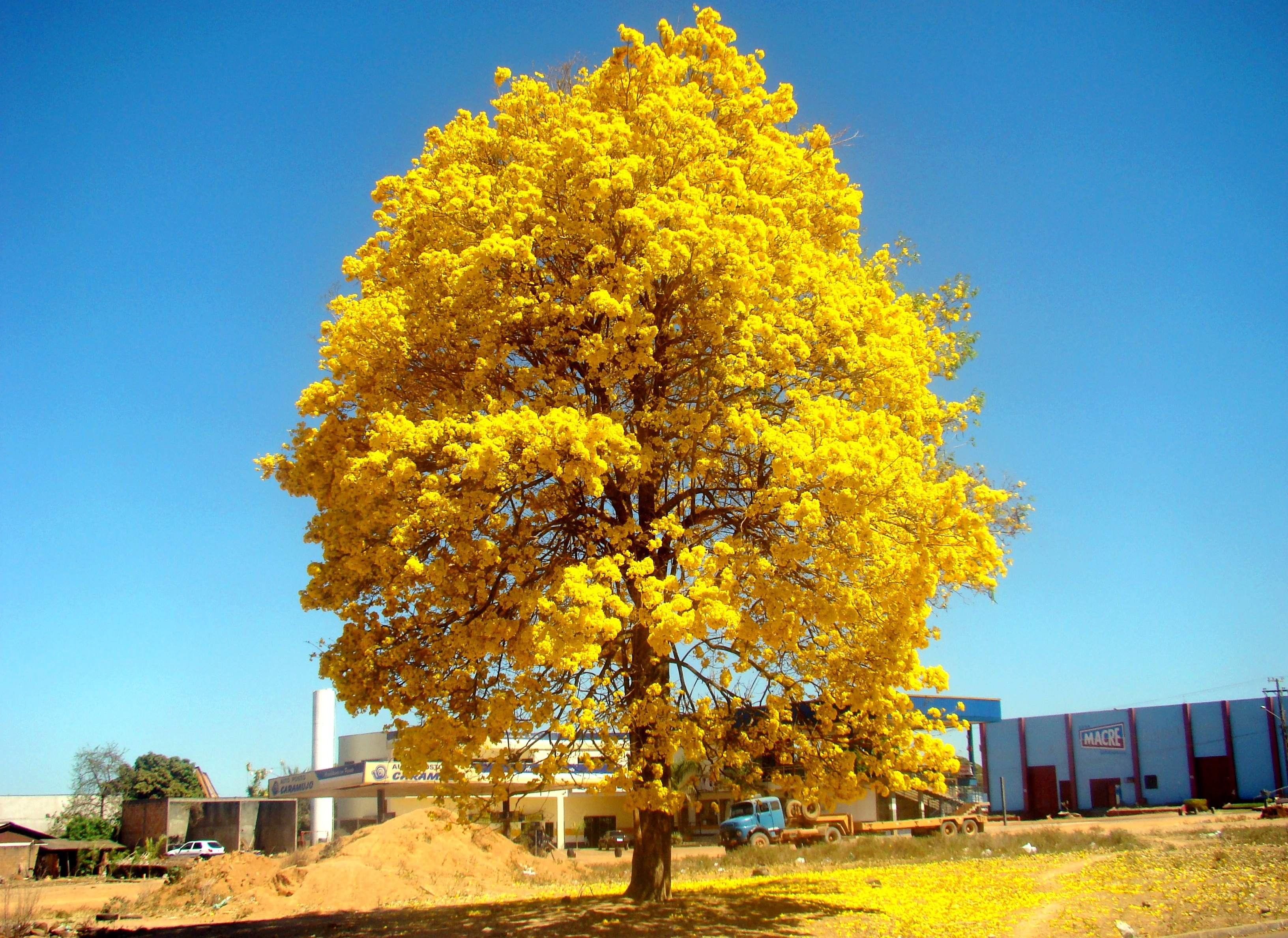 Ipê florido de Peixoto de Azevedo